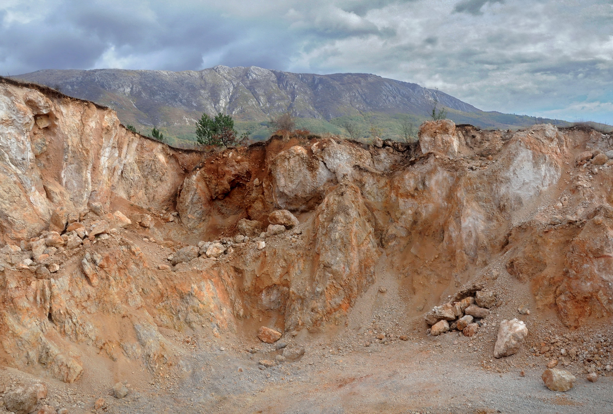 Srpski (latinica): Kamenolom na padinama Suve planine